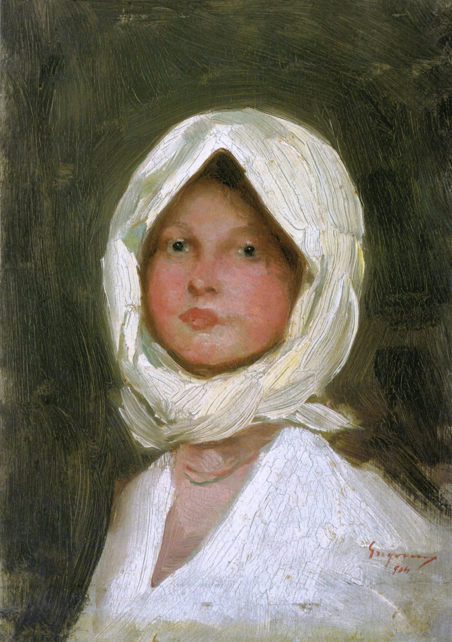 Mina, ulei pe lemn, 23x16cm, semnat și datat dreapta jos cu roșu: Grigorescu (1)904